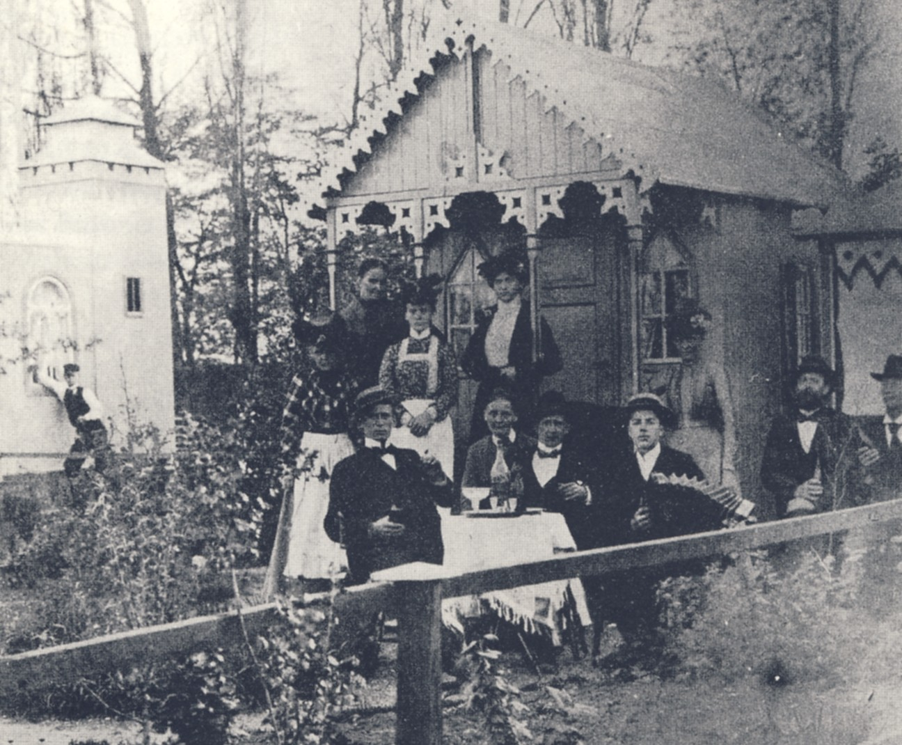 Pildammskolonin i Malmö 1898, Sveriges första koloniträdgård